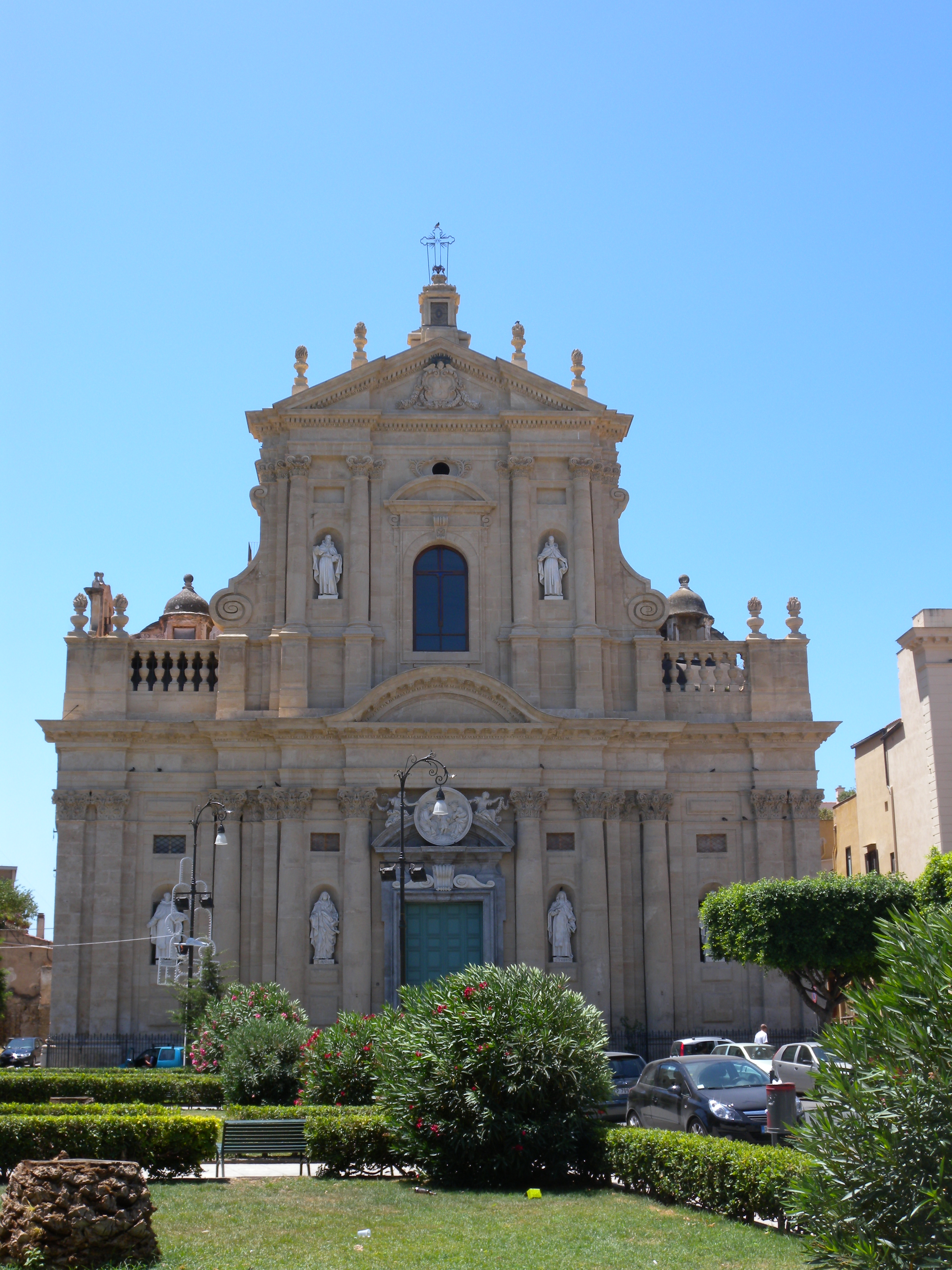 Palermo, Sicily